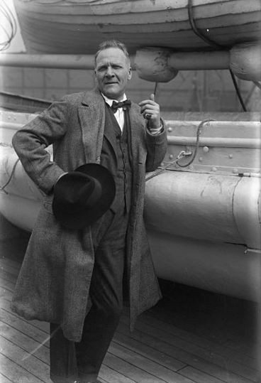 Feodor Chaliapin